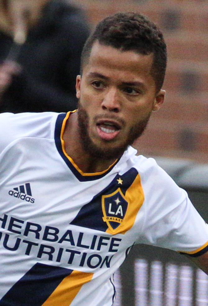 Dos Santos - MLS - LA Galaxy - Soccer